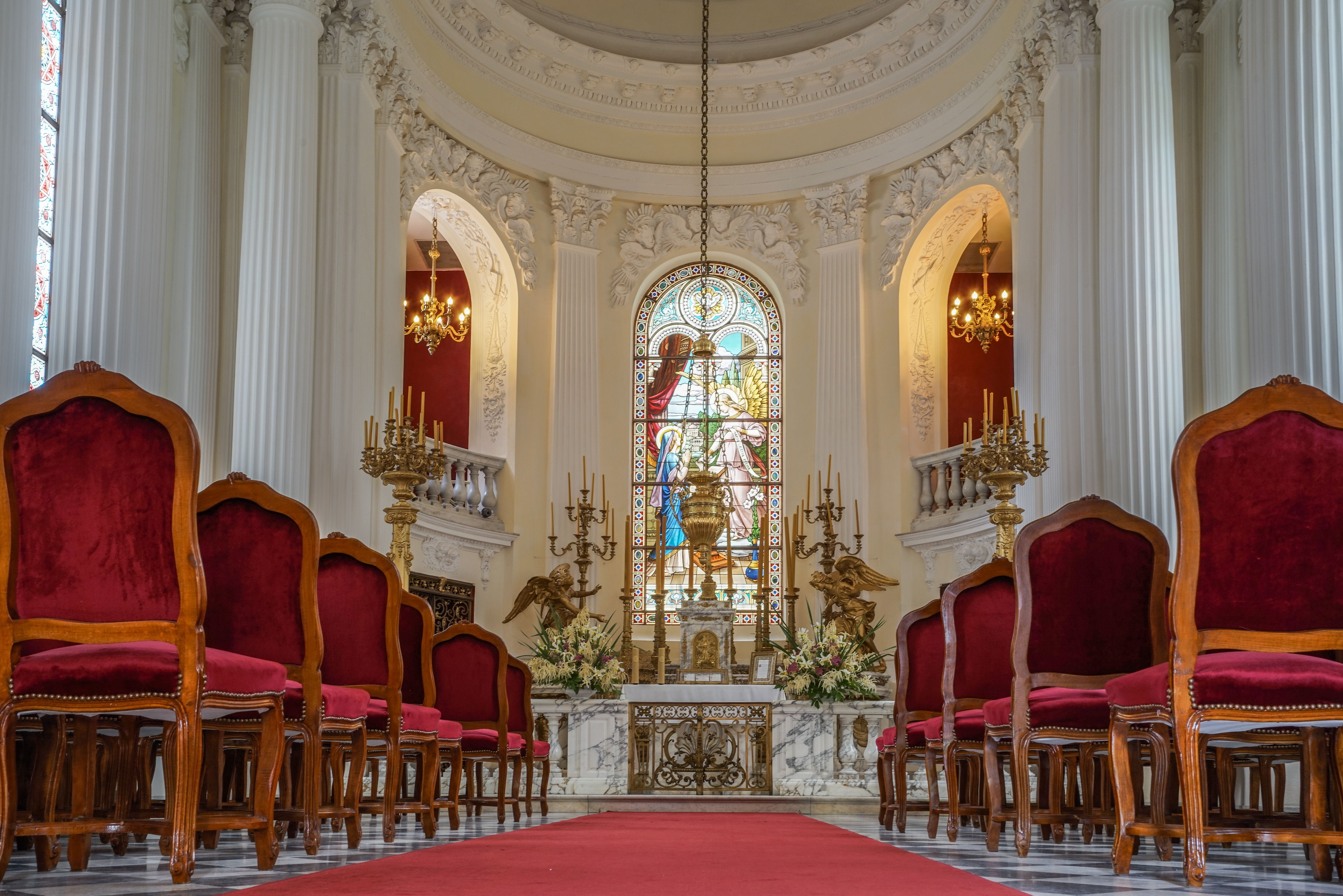 Kaplica pałacowa w Kozłówce. 06.1970 i z 16.03.1995.